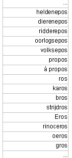 stukje van een retrograde woordenlijst